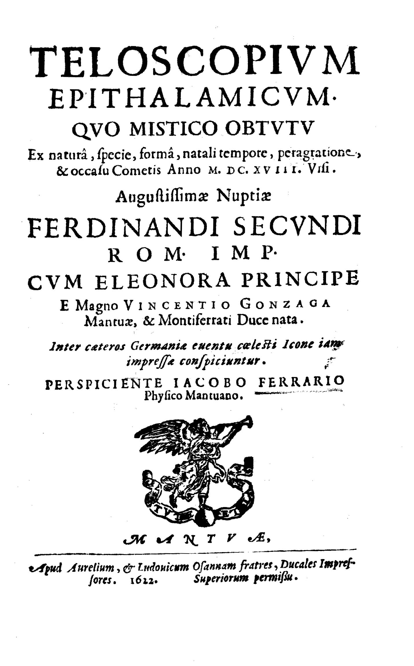 Teloscopium epithalamicum quo mistico obtutu ex natura, specie, forma, natali tempore, peragratione & occasu cometis anno 1618. visi [sic]. Augustissimae nuptiae Ferdinandi Secundi ... conspiciuntur. perspiciente Iacobo Ferrario physico mantuano. - Mantuae : apud Aurelium, & Ludouicum Osannam fratres, ducales impressores, 1622. - 12 p. ; 4º .